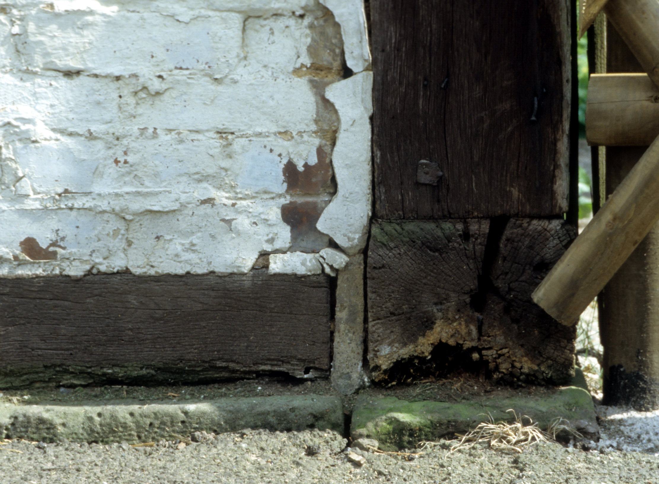 geschädigte Schwelle einer Fachwerkscheune